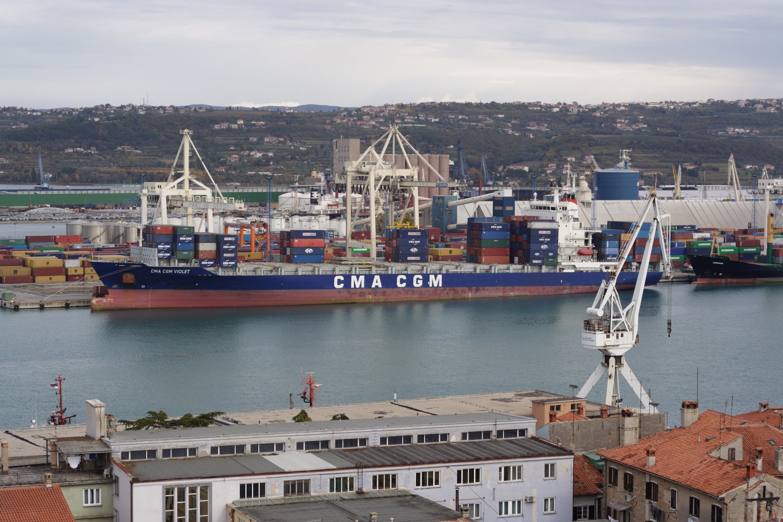 Koper